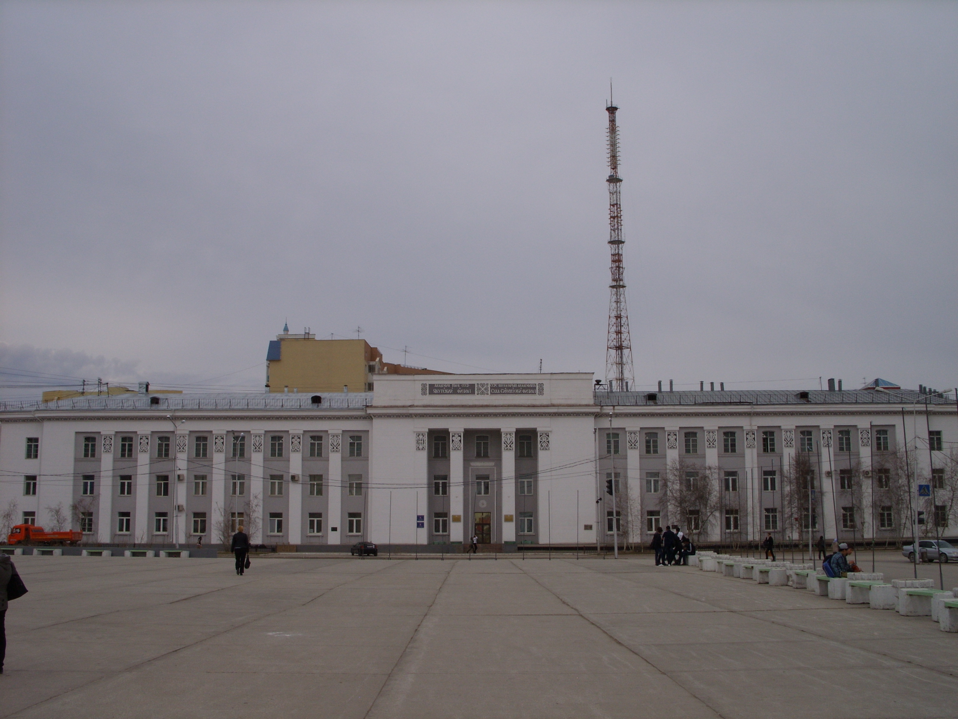 Здание Президиума Якутского филиала Сибирского отделения РАН.